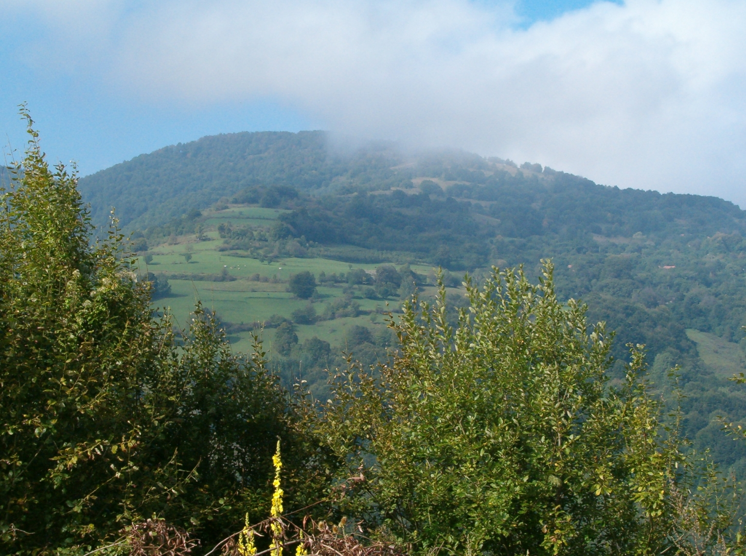 Вучеделце - Vučedelce